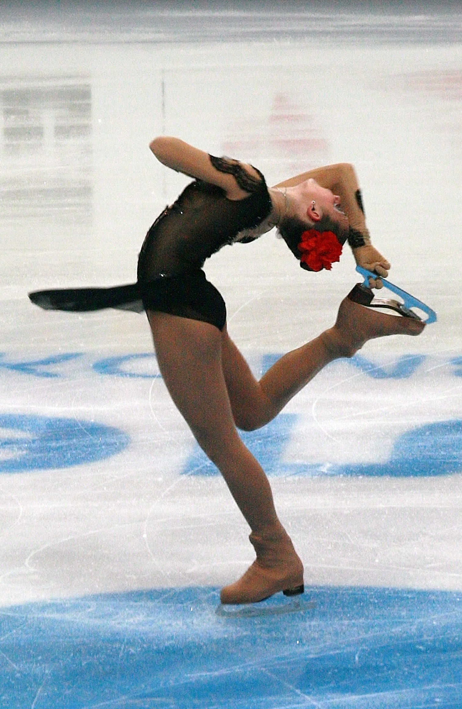 Аделина Сотникова на Кубке Ростелекома 2012. Короткая программа.